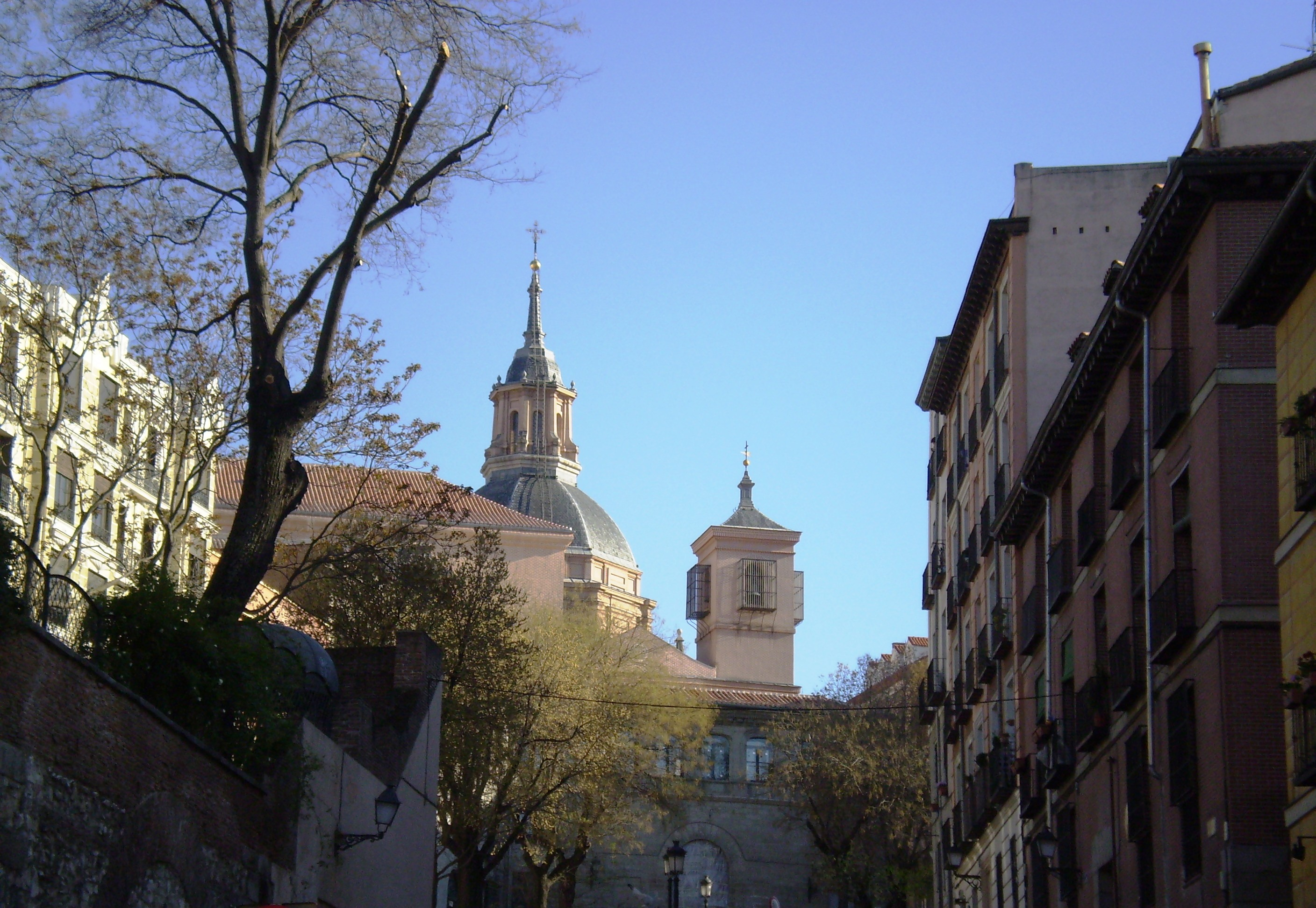 Plaza de la Paja, Madrid, Spain